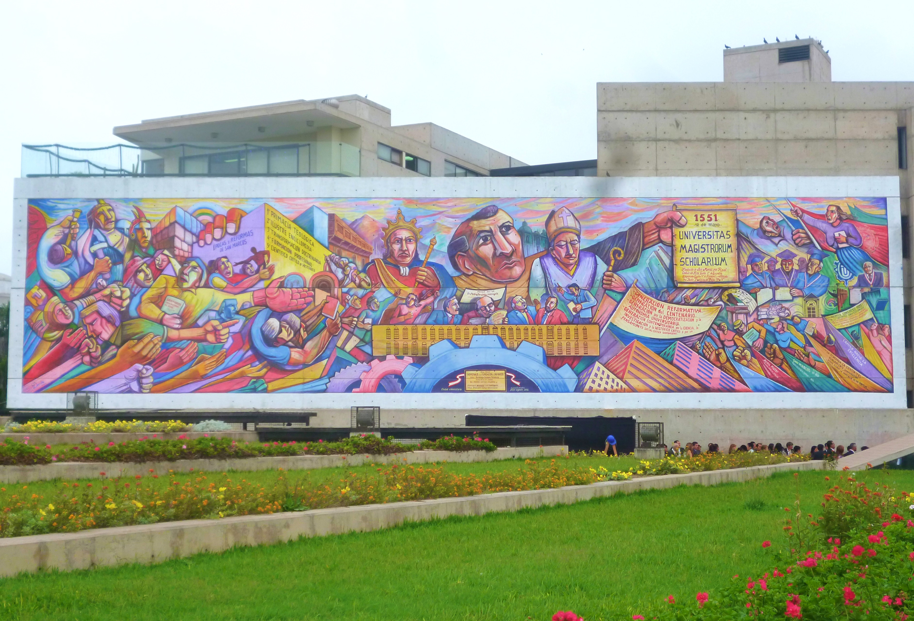 Mural de la Universidad Nacional Mayor de San Marcos ubicado en la sede de su Rectorado (Lima, Perú).